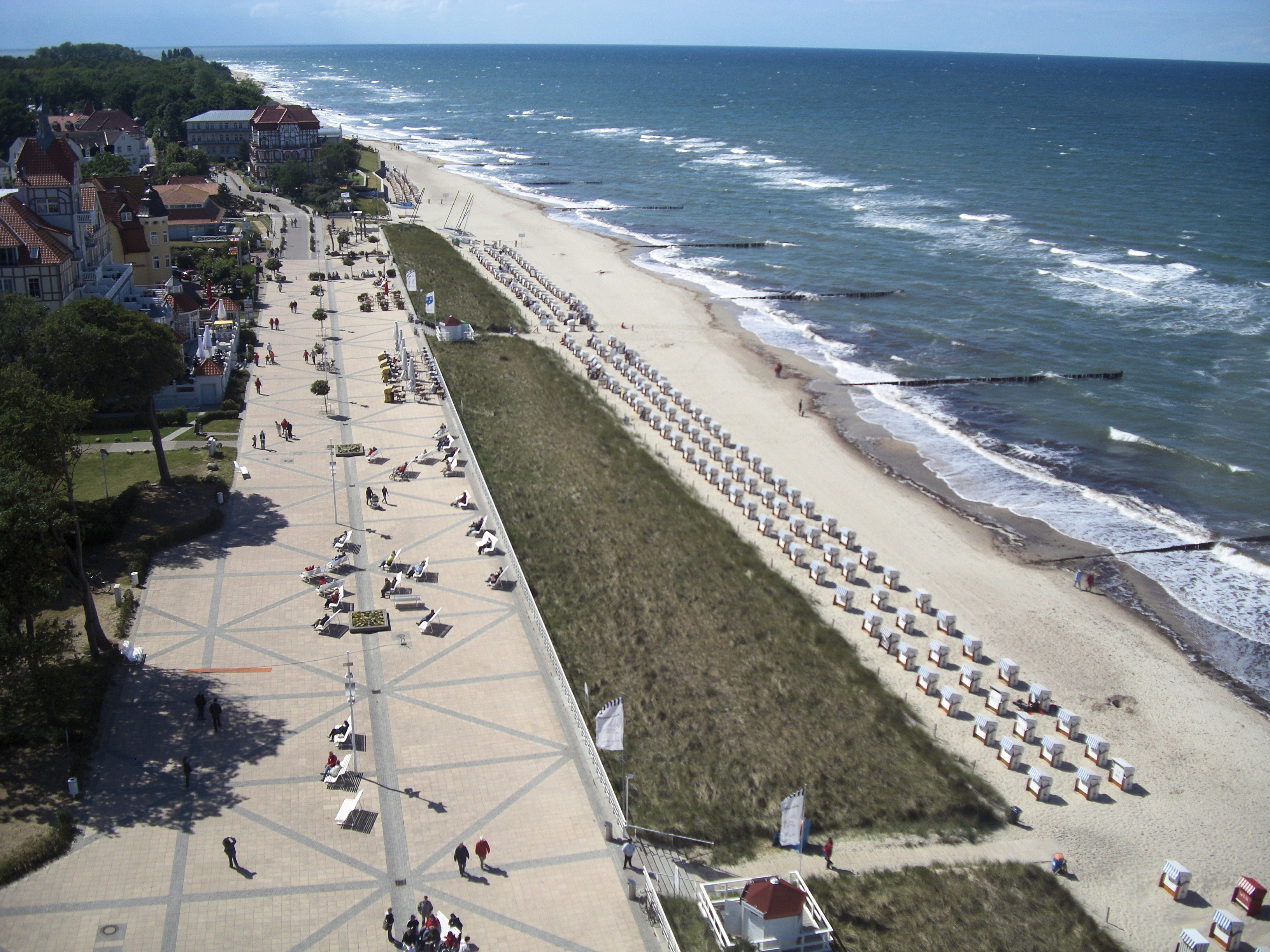 Strandpromenade Kühlungsborn